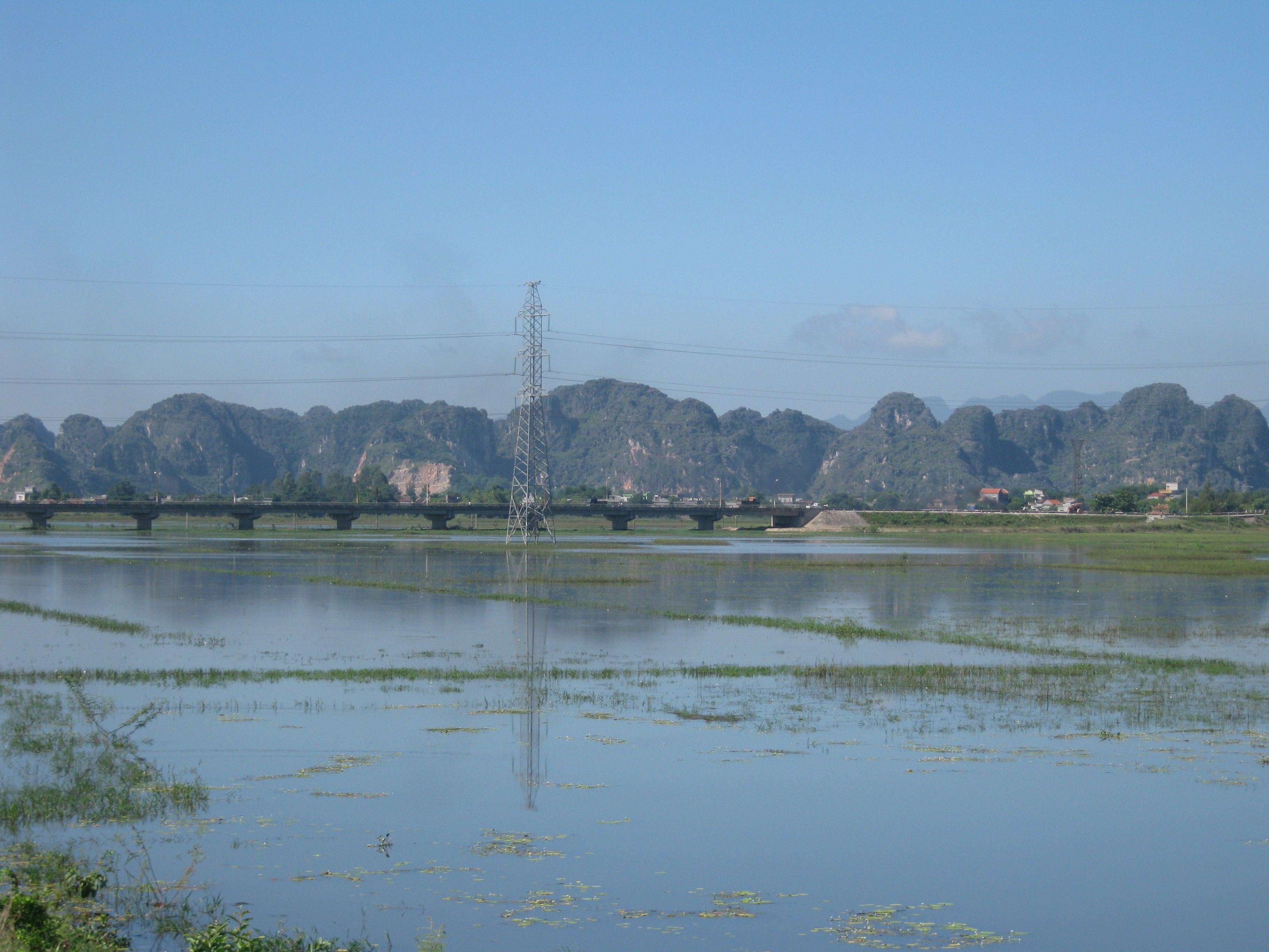 Phong cảnh Gia Viễn